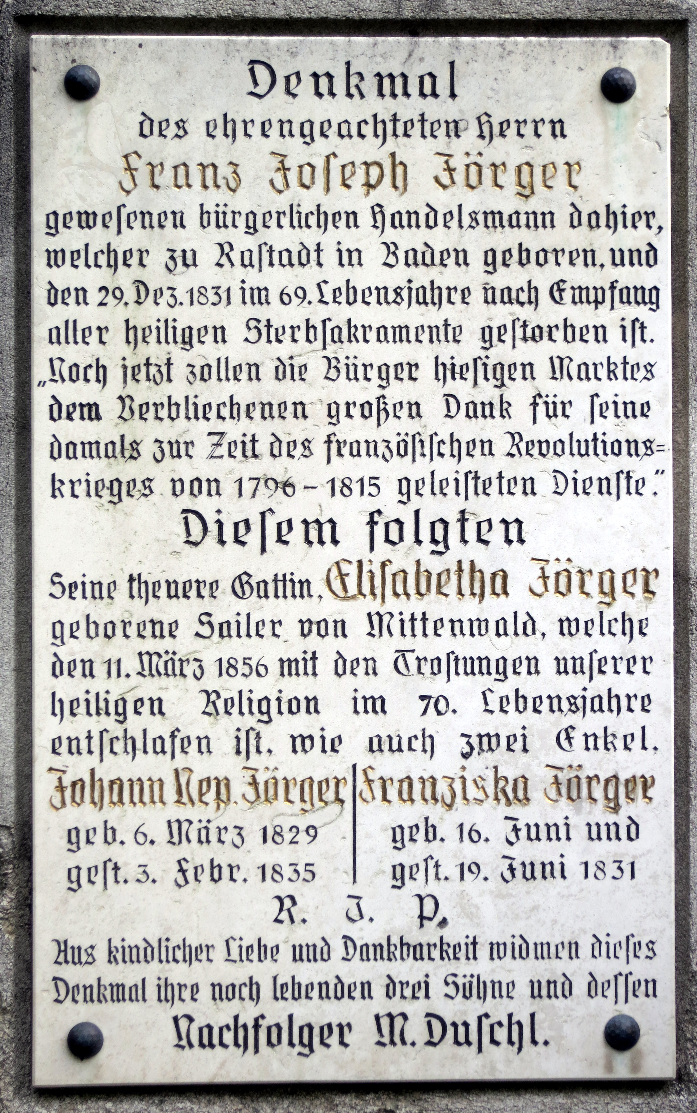 Grabstein auf dem Friedhof bei der Loretokapelle Altomünster; Joseph Jörger